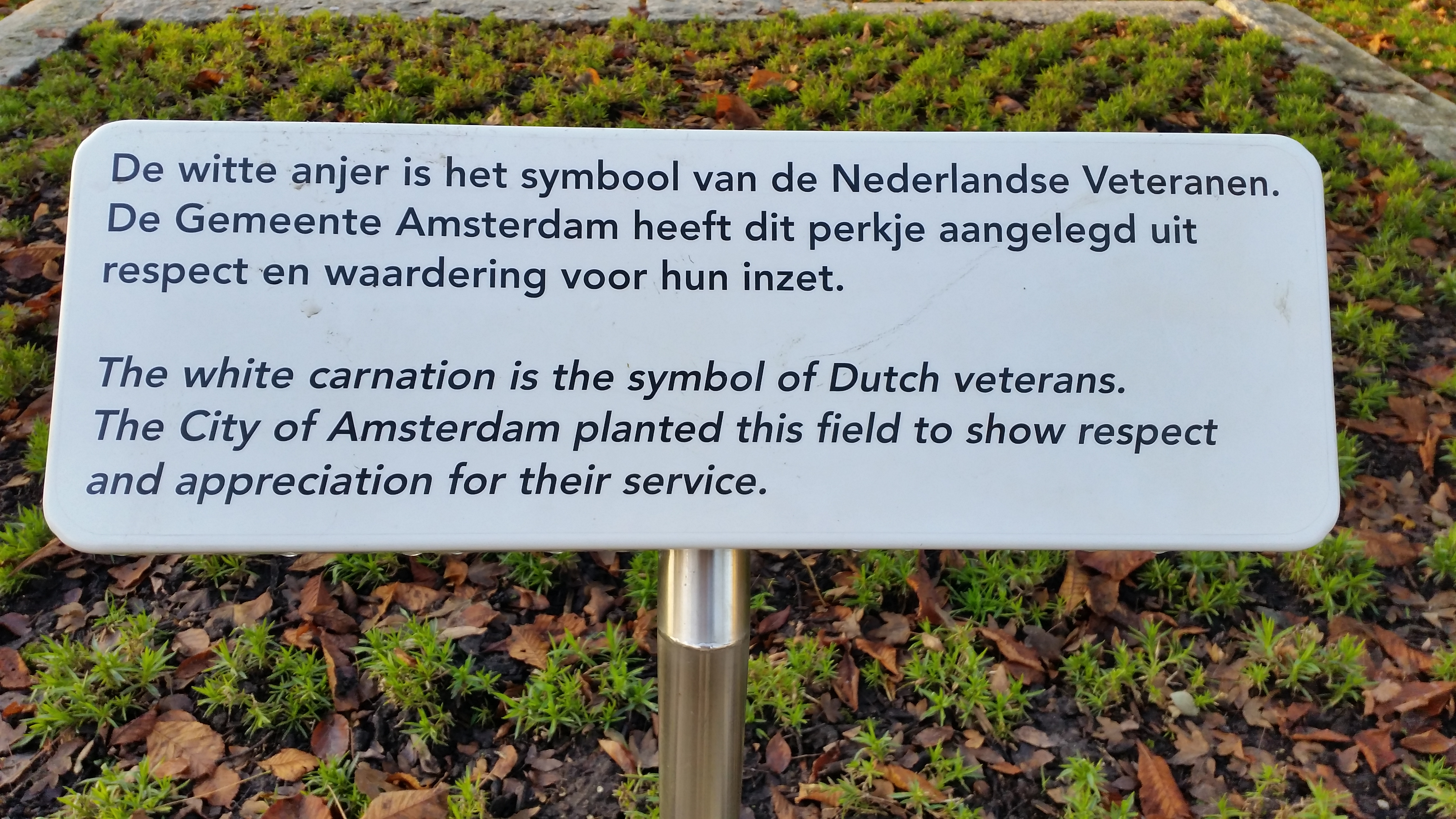 Bordje van de gemeente bij het Anjerperk veteranen Vondelpark